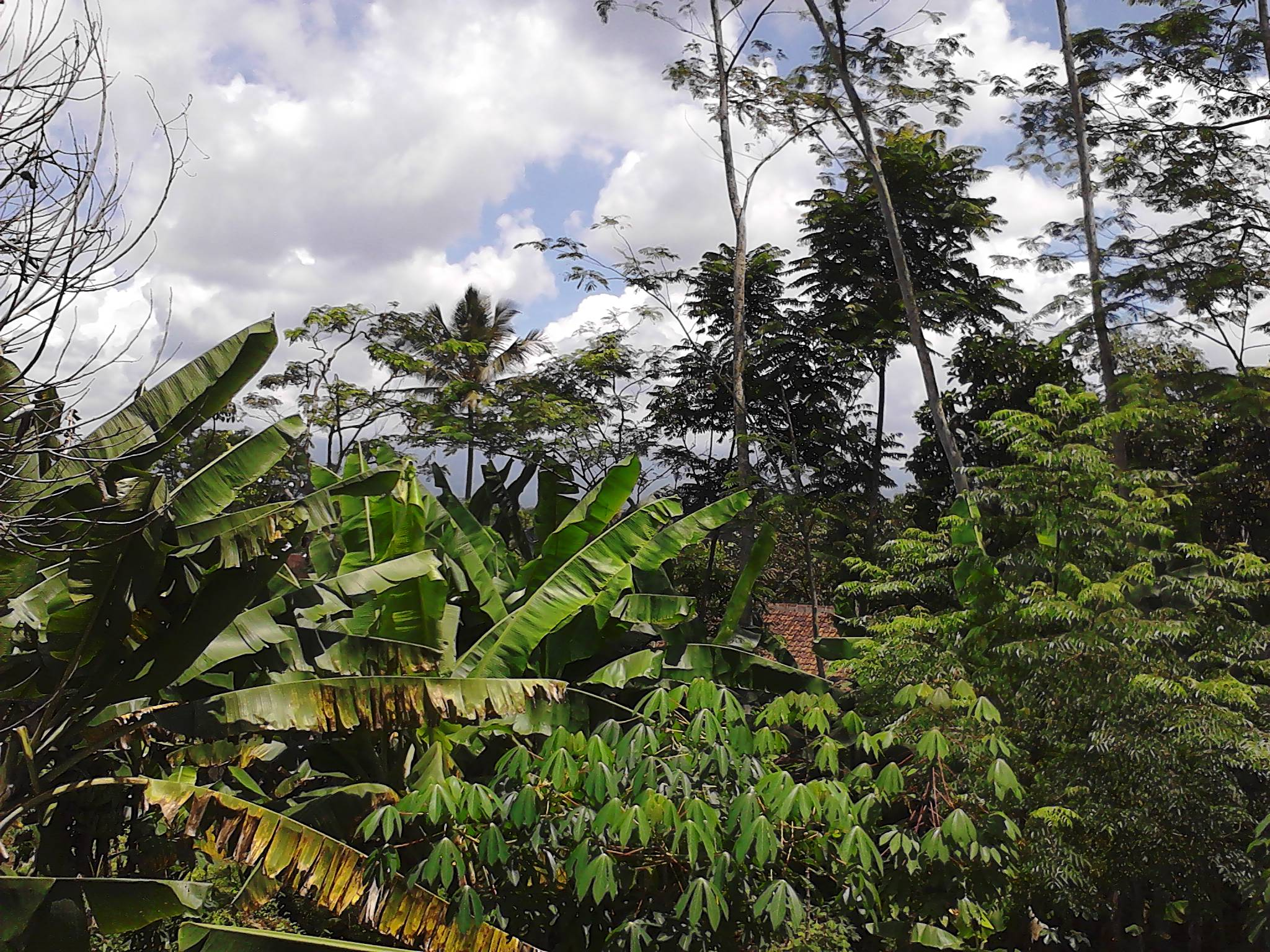 Kebun belakang rumah